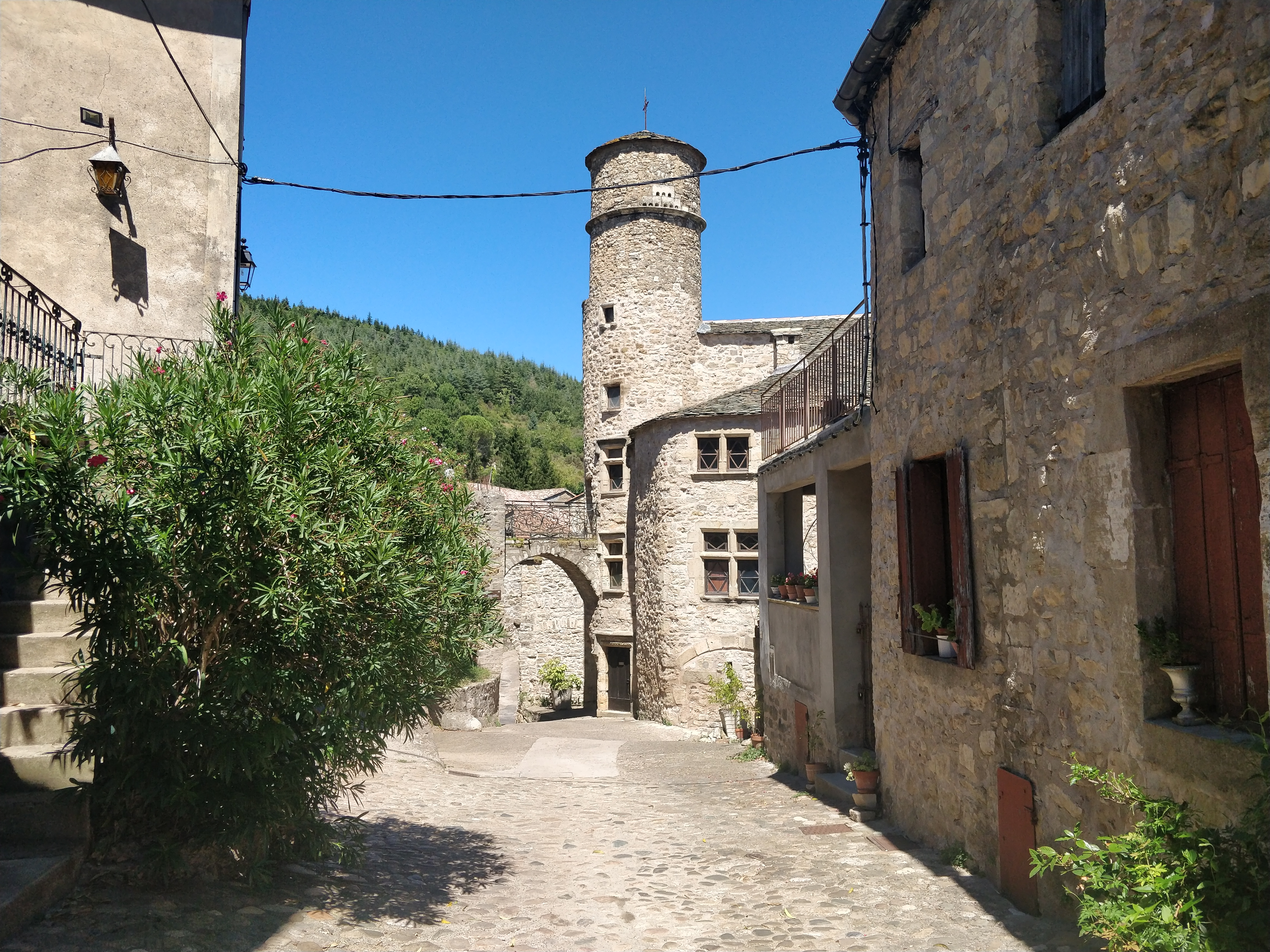 Maison du Bailli de l'intérieur des murs